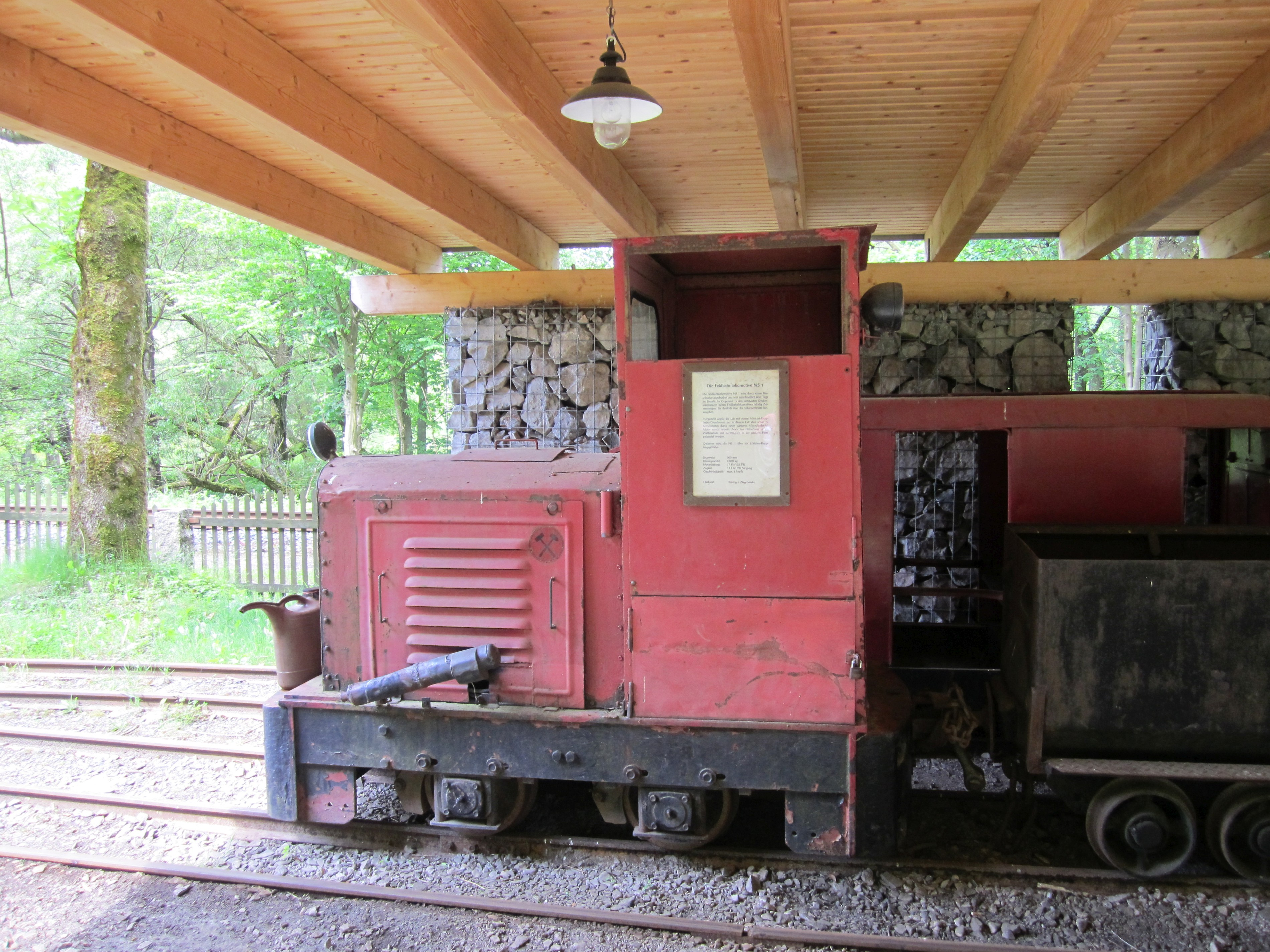 Feldbahnlokomotive LKM Ns 1 im Besucherbergwerk Rabensteiner Stollen. Netzkater, Thüringen, Deutschland. (Ergänzung: Lok LKM vermutlich von 1986 bis 1991 Ziegelei Ferna)